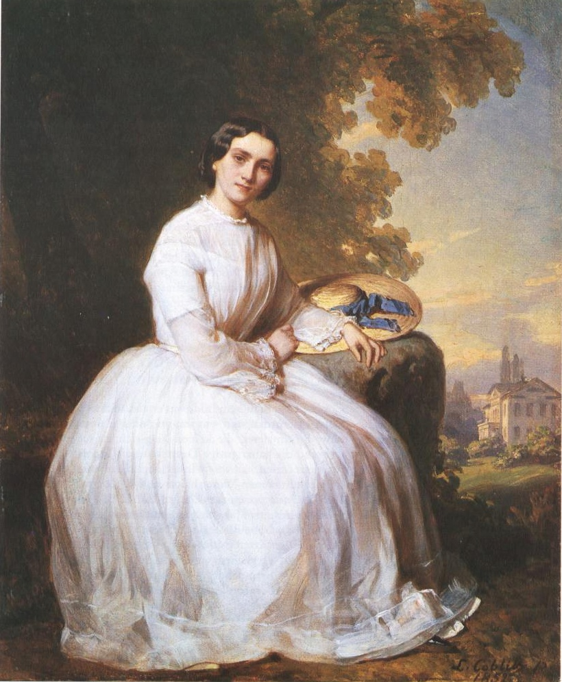 Marie Lamey geb. Dyckerhoff aus Mannheim, Tochter von Jacob Friedrich Dyckerhoff und Ehefrau von August Lamey